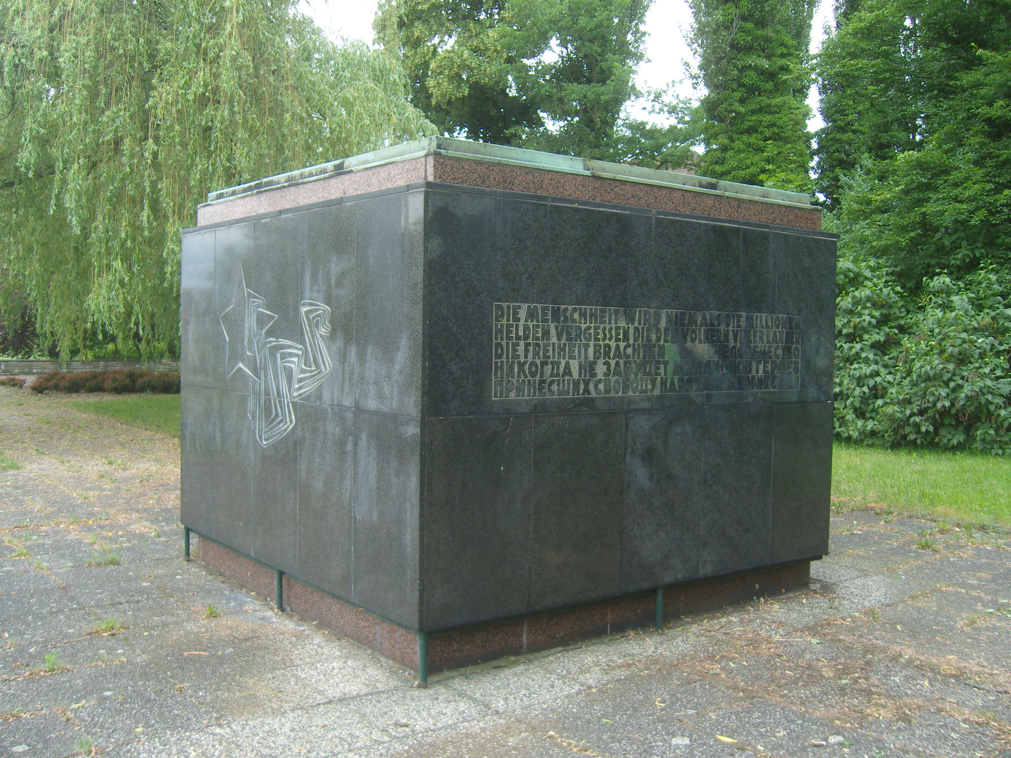 Gedenkstätte für die Gefallenen der Roten Armee in Senftenberg, Rückseite des Quaders